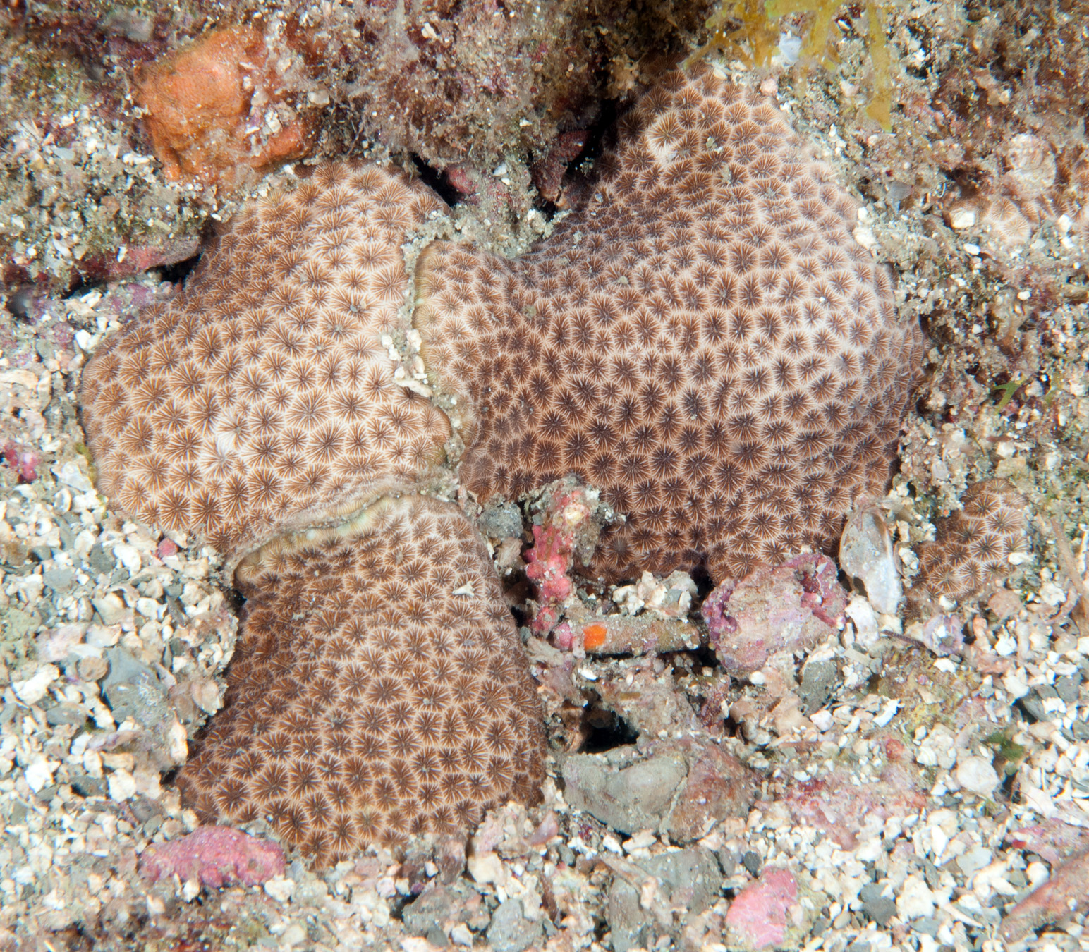 Siderastrea radians con pólipos retraídos, en el Santuario Nacional Marino de Flower Garden, EE.UU.